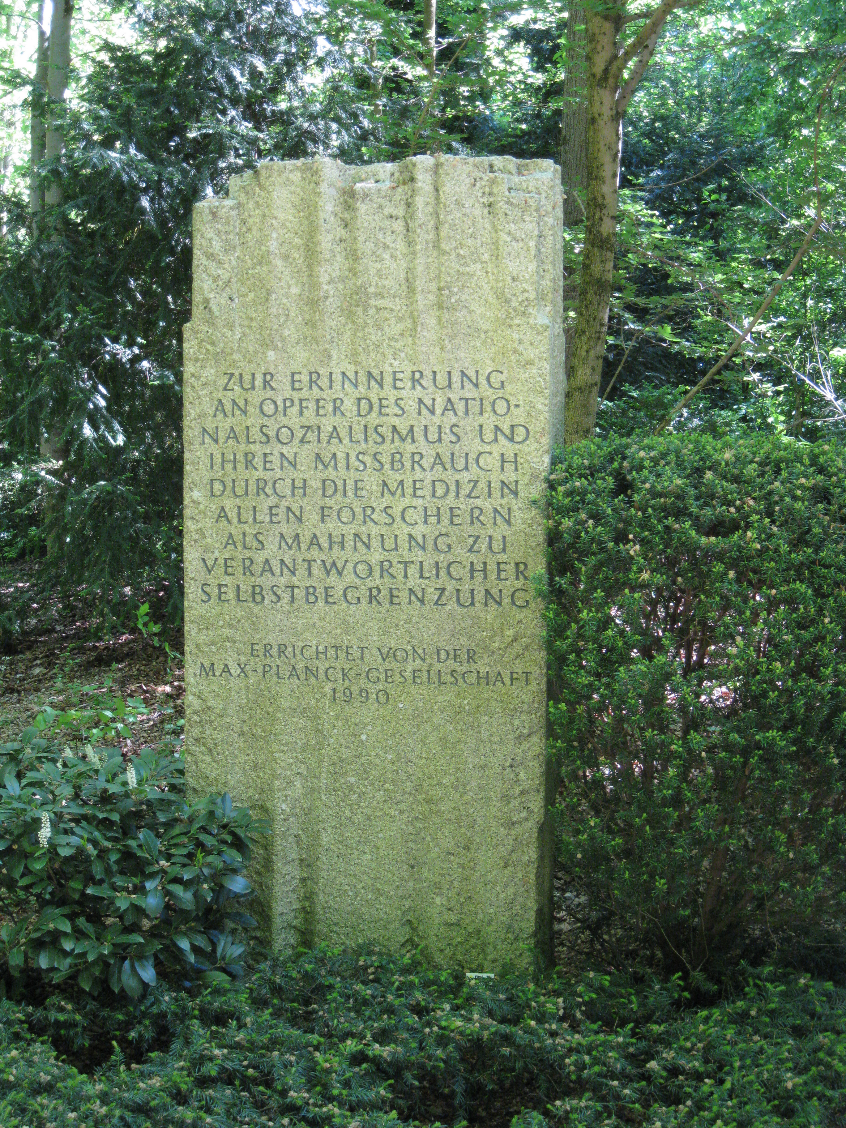 Mahnmal für Opfer der Euthanasie, deren Gehirne in den Kaiser-Wilhelm-Instituten für Psychiatrie (München) und für Hirnforschung (Berlin-Buch) für medizinische Untersuchungen genutzt worden sind.